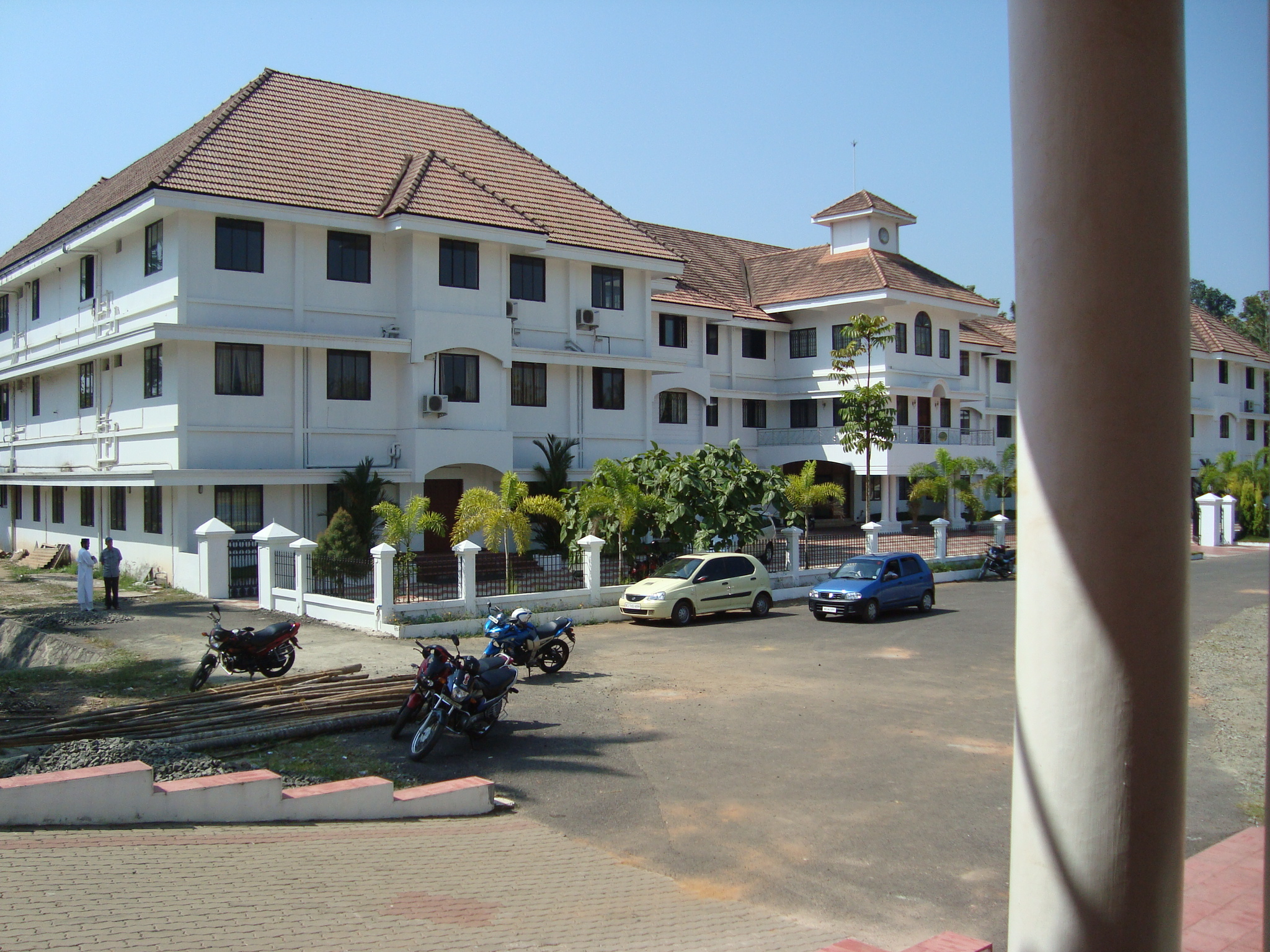 Hauptquartier der Malankara Syrisch-Orthodoxen Kirche in Puthencruz, Kerala, Indien